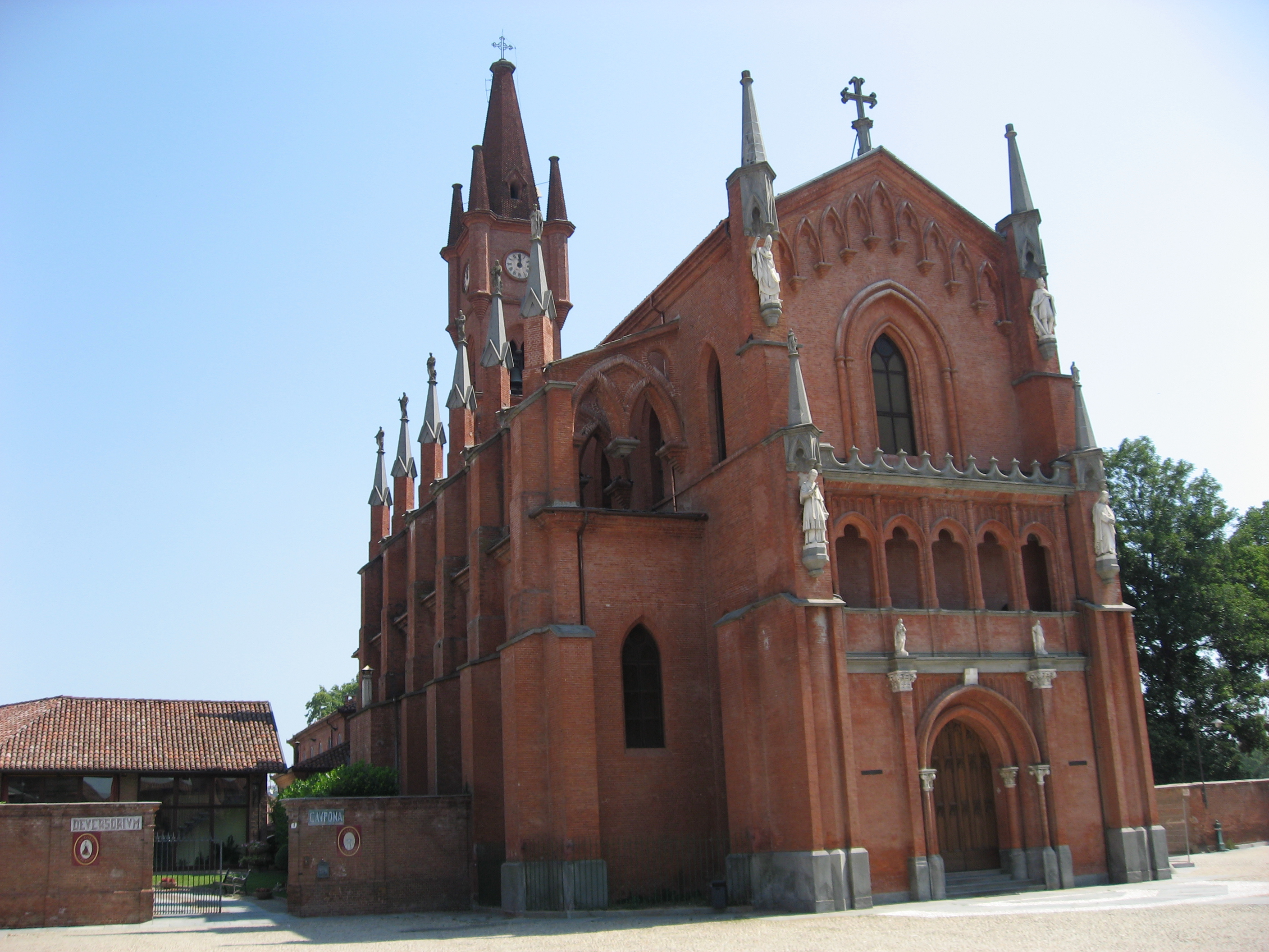 San Vittore church in Pollenzo (Provincia di Cuneo, Piemonte, Italy)